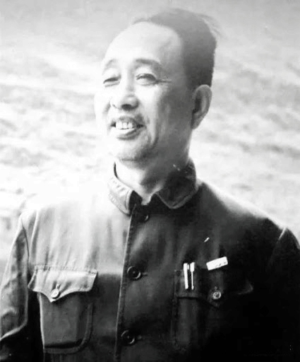 张敬焘（1914～2002），山东淄博人，中国共产党政治人物。